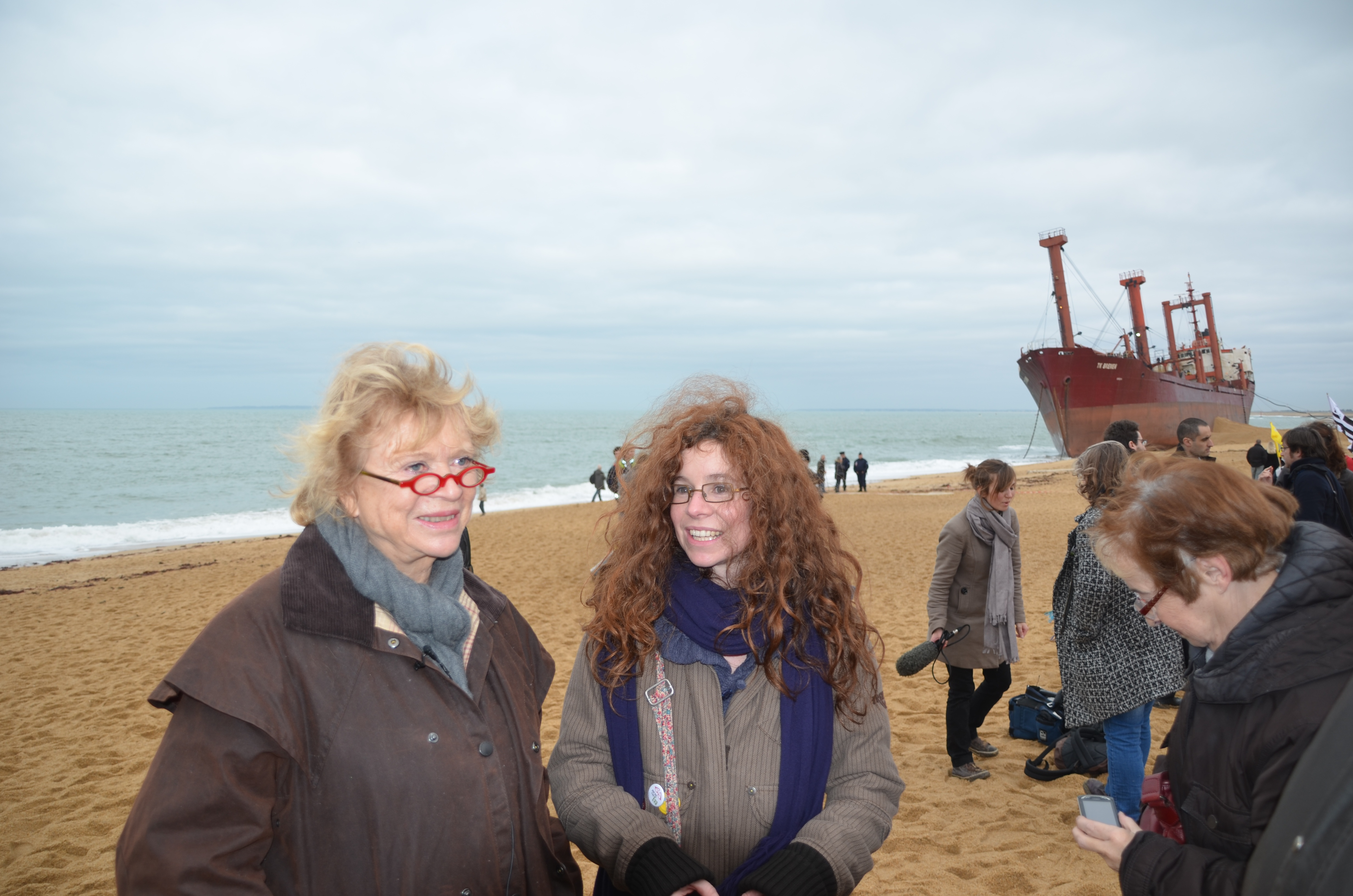 Eva Joly et Julie Le Goïc, candidate aux législatives 2012 dans la deuxième circonscription du Finistère, devant l'épave du TK Bremen sur la plage de Kerminihy à Erdeven.